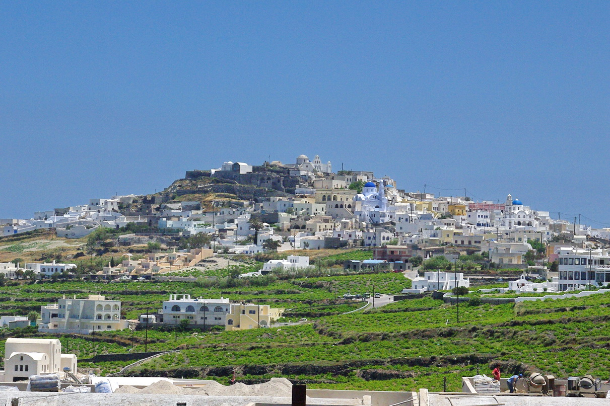 Pyrgos ist das höchstgelegene Dorf von Santorini